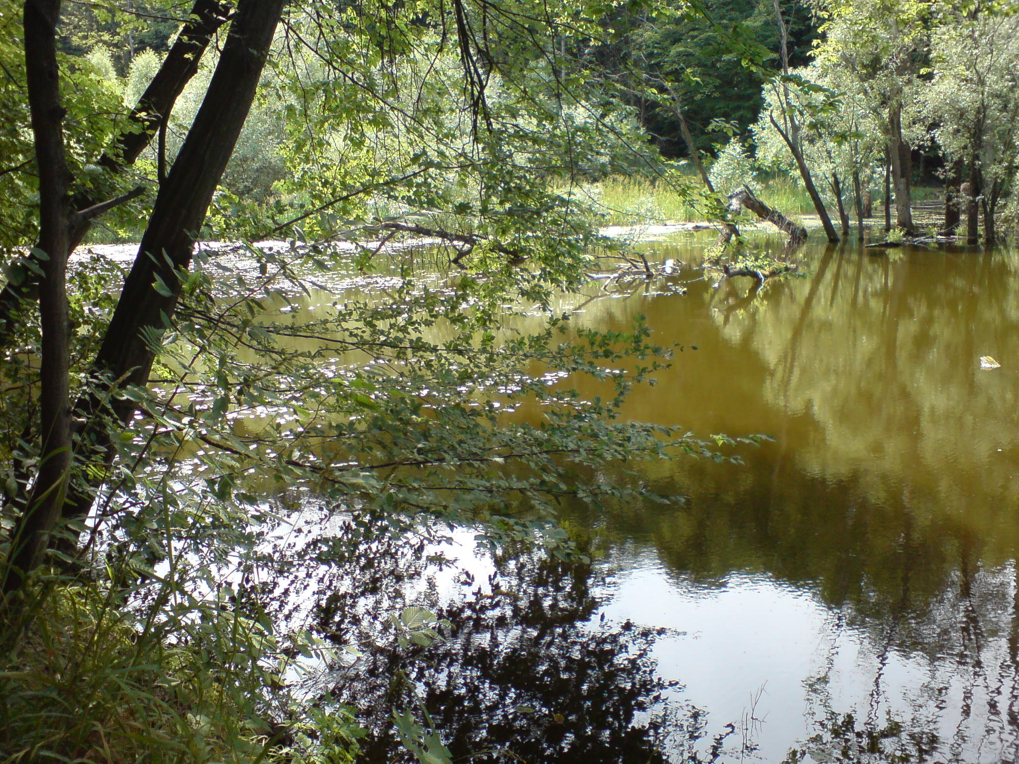 Kiev. Golosiivsky forest. Kytaiv lakes.